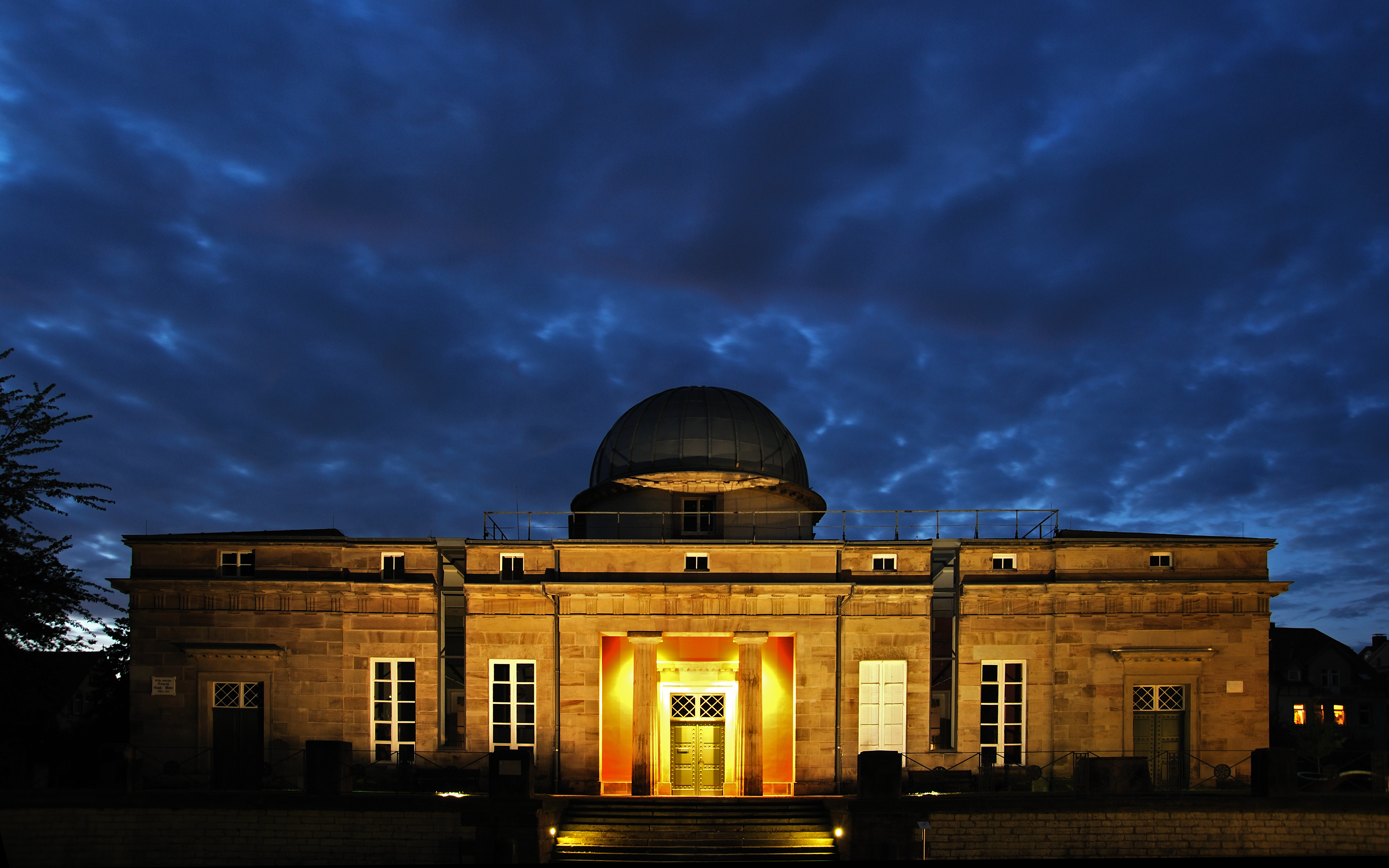 die historische Sternwarte Göttingen in Abenddämmerung